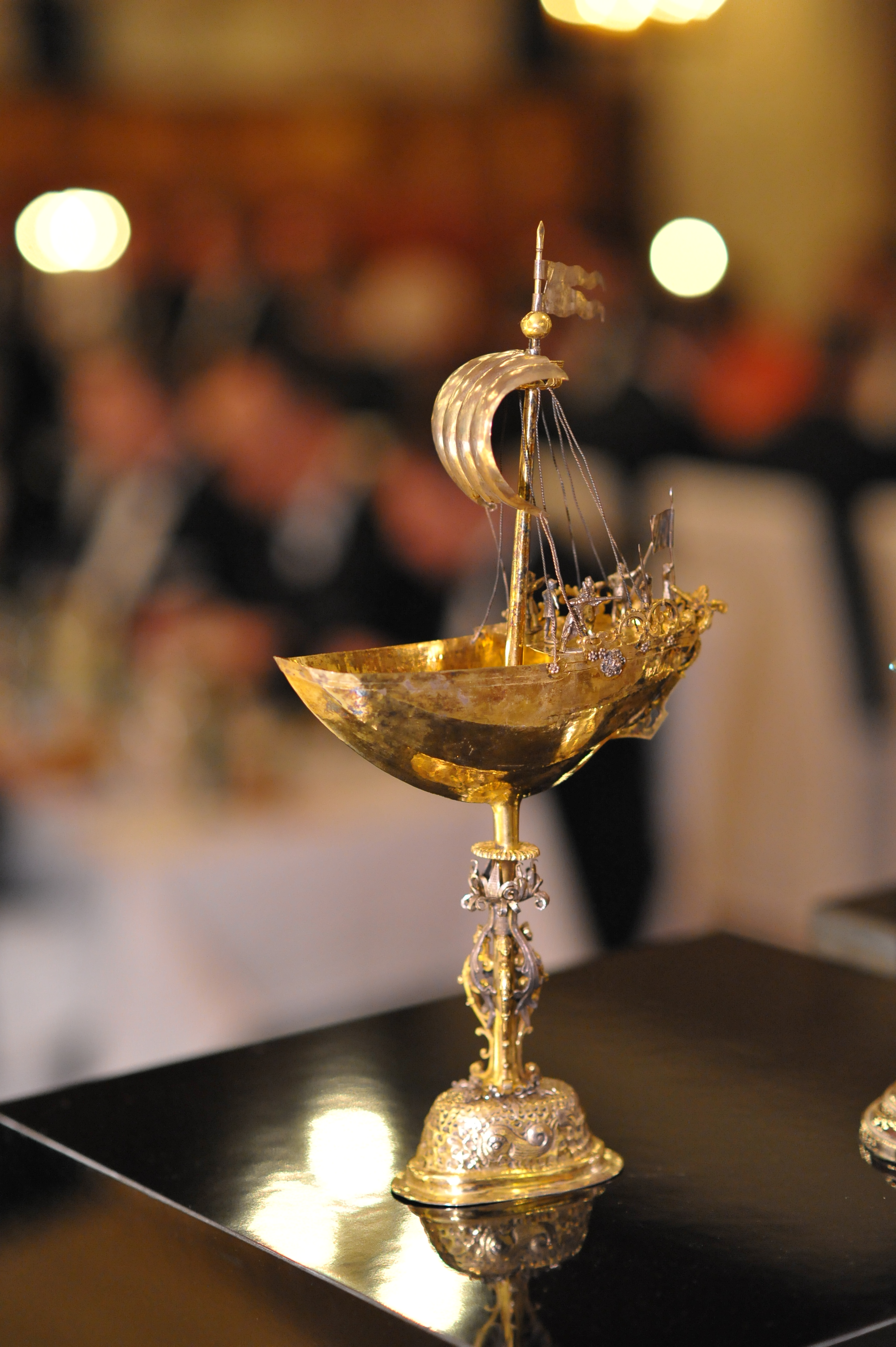 kostbares Trinkgefäß "Schiffchen" des münsterschen Goldschmieds Melchior von Bueren von Anfang des 17. Jahrhunderts, erworben vom Verein der Kaufmannschaft 1954